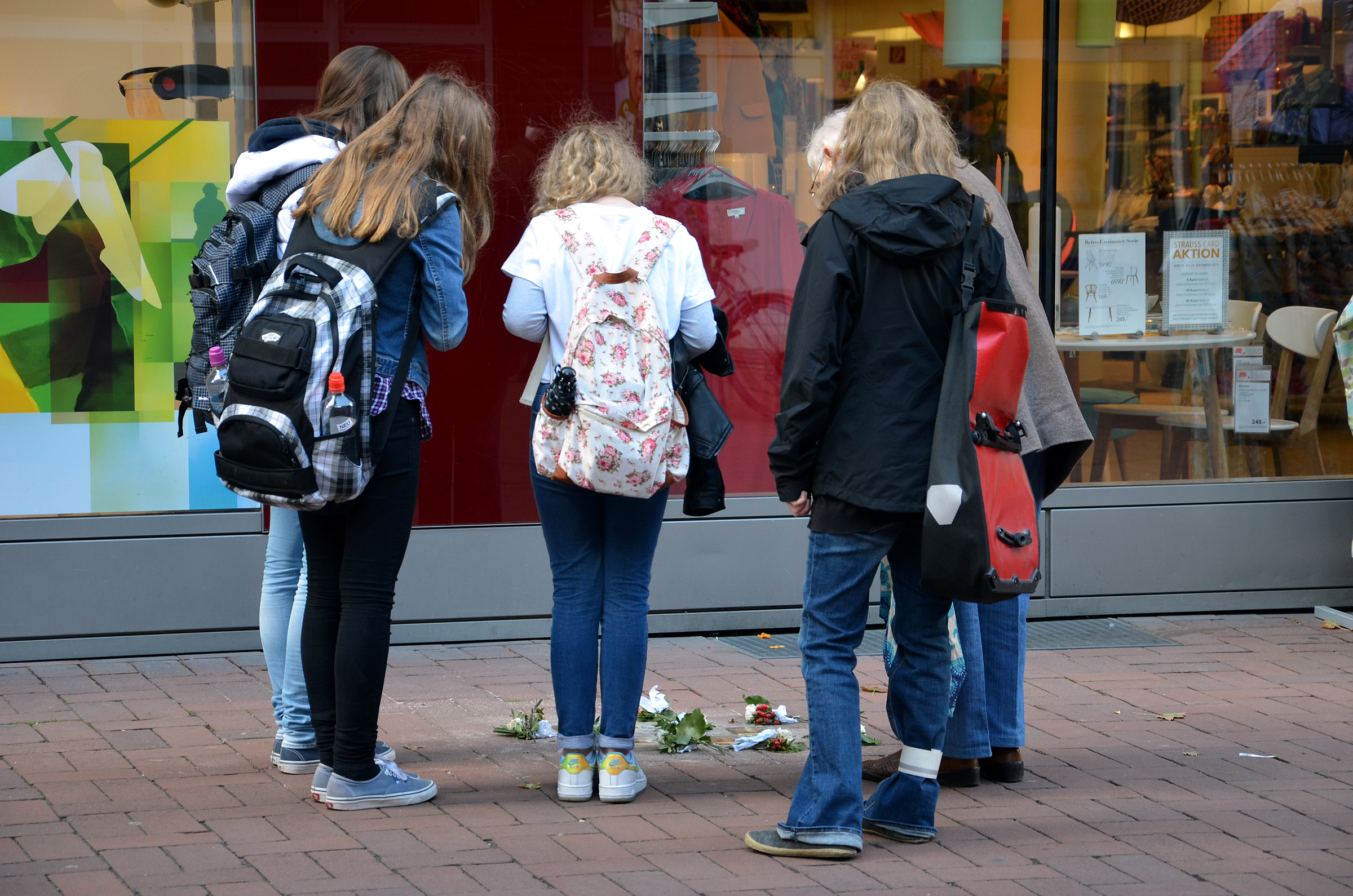 Am 18. September 2013 verlegte der Künstler Gunter Demnig in Anwesenheit beispielsweise des seinerzeitigen Oberbürgermeister-Kandidaten Stefan Schostok, Rainer Hoffschildt und anderen acht Stolpersteine im Bürgersteig vor dem Waren- und Wohnhaus Lister Meile 77/79 in Hannover. Die Stolpersteine erinnern seitdem an die folgenden Opfer des nationalsozialistischen Terrors: Moritz Weintraub, Amalie Debora Weintraub, Saul Israel Sojbel, Philipp Jacobs, Gerson Jacobs, Erna Jacobs, Frieda Katzenstein und Arthur Goldwein ...